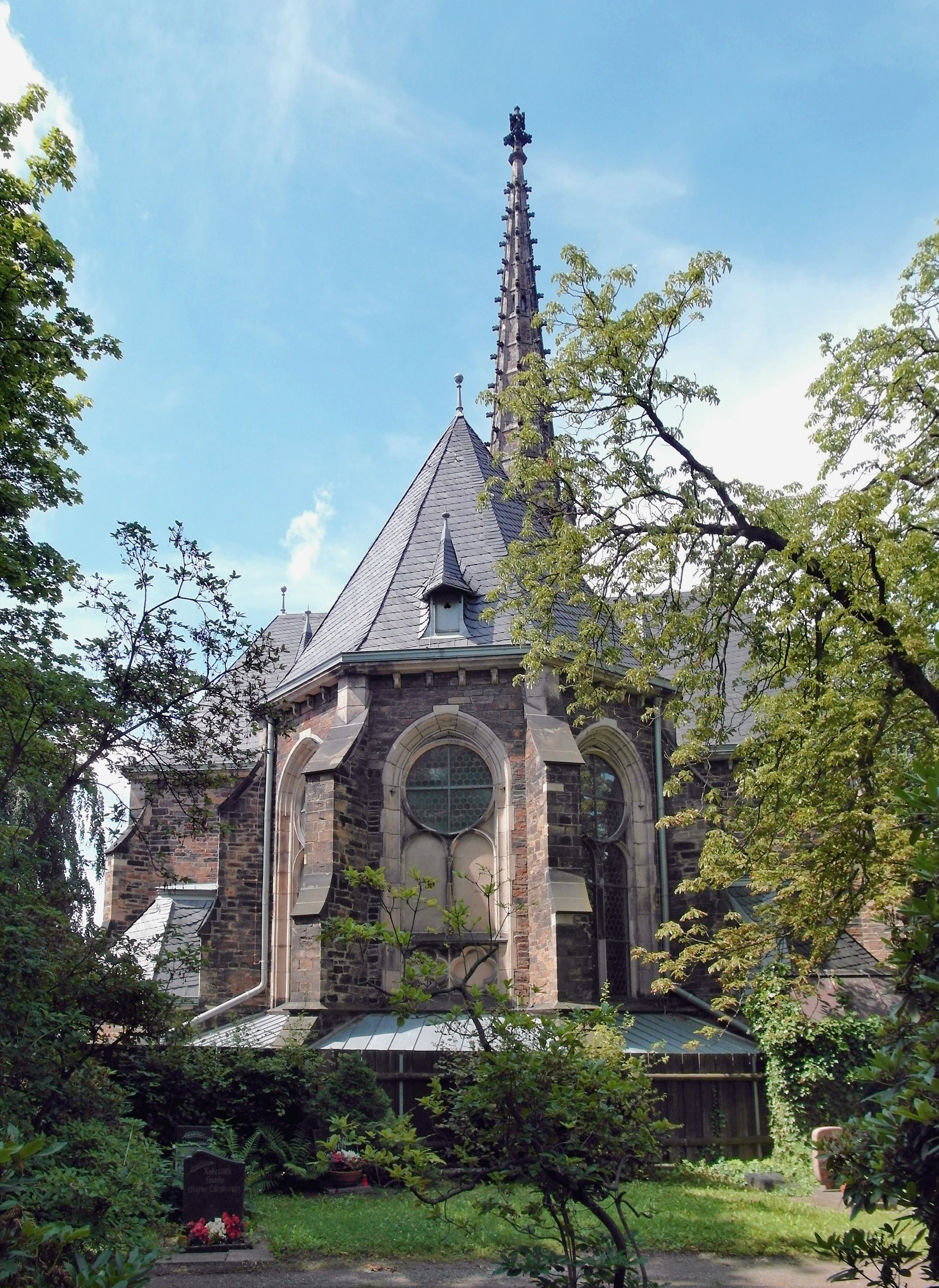 23.07.2015 09599 Freiberg: Blick vom Donatsfriedhof am Donatsring zur Chorpartie der Jakobikirche, (1890-1892), Dresdner Str. 1 (GMP: 50.917381,13.350390). In der Kirche befindet sich eine Silbermann-Orgel von 1716/17. [SAM1151.JPG]20150723150DR.JPG(c)Blobelt